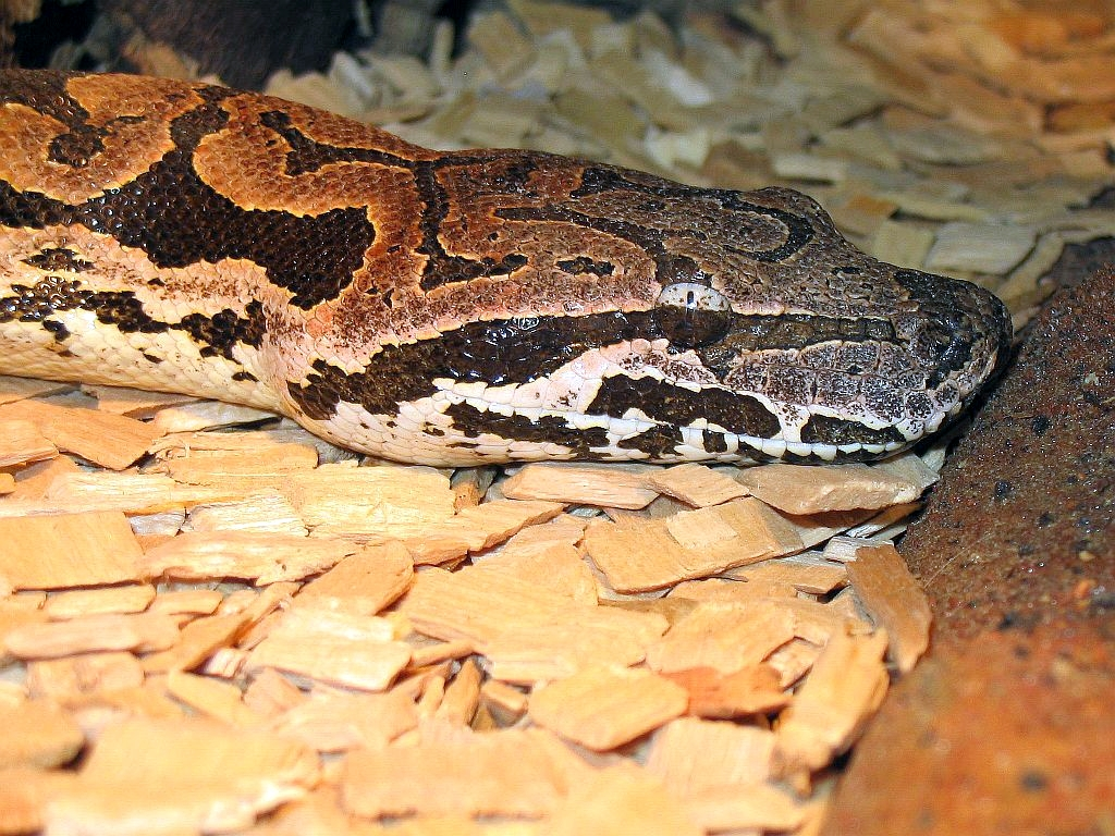 Madagaskar Boa (Acrantophis dumerili)